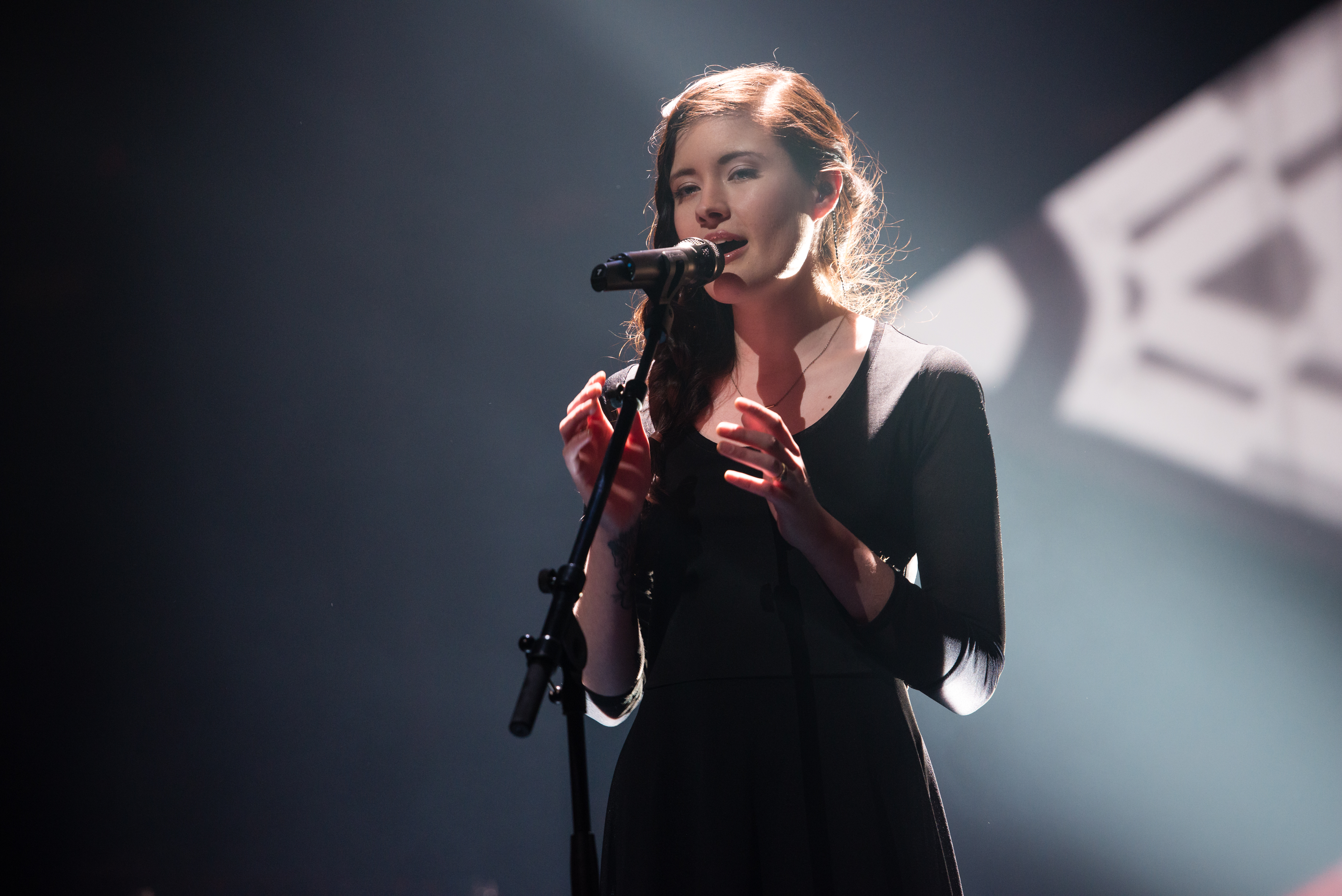 'Eurovision Song Contest 2014 - Unser Song für Dänemark': 'Madeliene Juno'